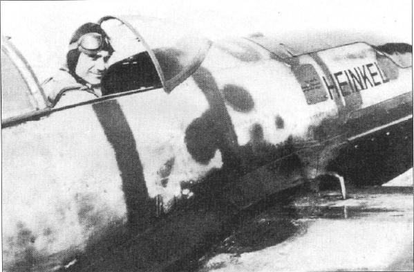 Ганс Дитерли в кабине рекордного Не 100V8 после полёта 30 марта 1939 года.